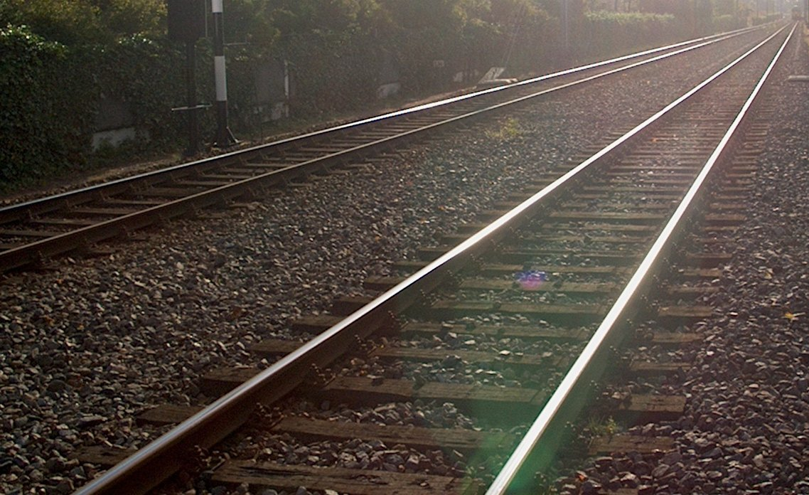 Dubbelspoor bij station Hoorn Kersenboogerd (NL). (IM010791.JPG)